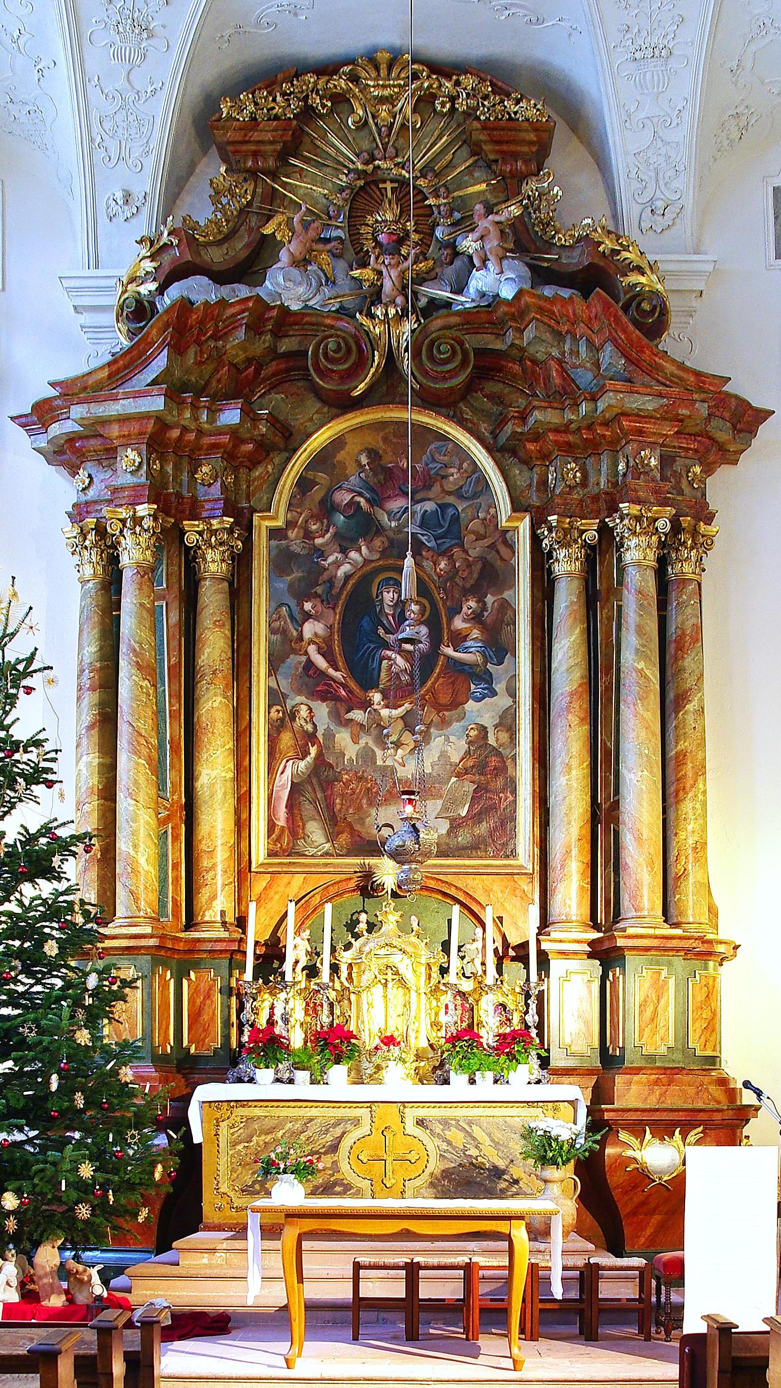 St Ursula (Freiburg)